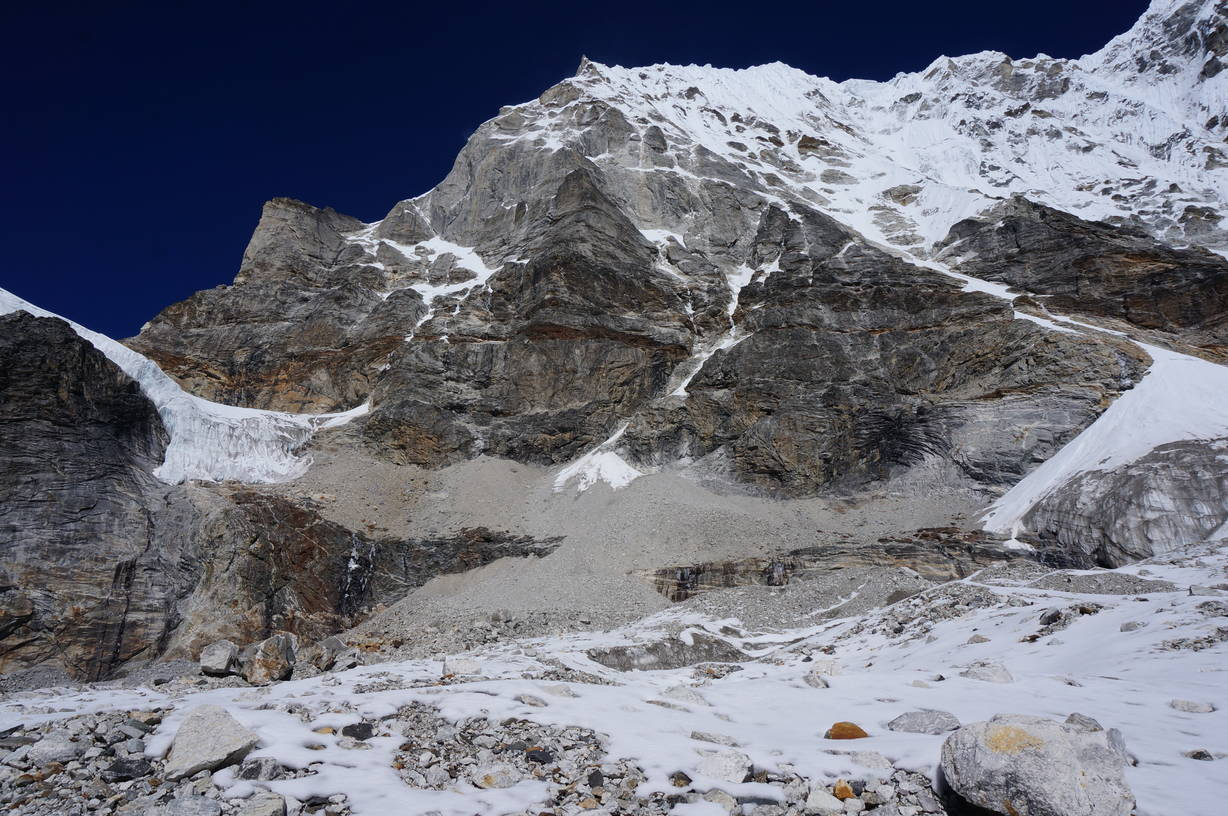 Tashi Laptsa von Osten, Grenze Rolwaling Himal zu Khumbu Himal